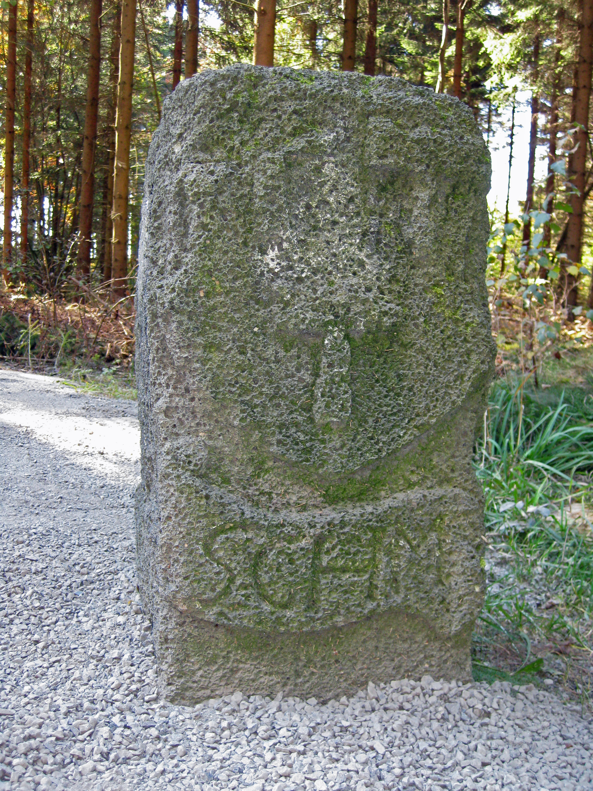 "Vierherrenstein", Dahlem This is the photograph of an architectural monument. It is part of the list of cultural monuments of Dahlem (Nordeifel), no. 23